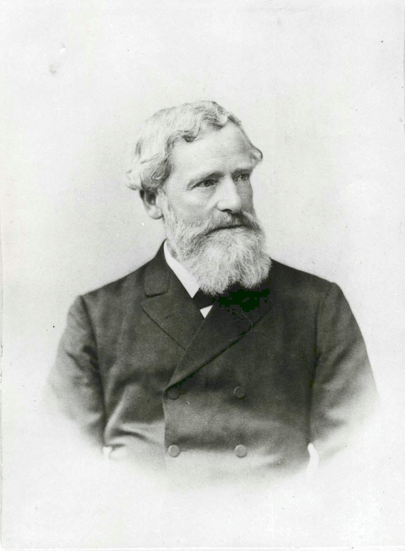 Scan Portrait eines Familienfotos